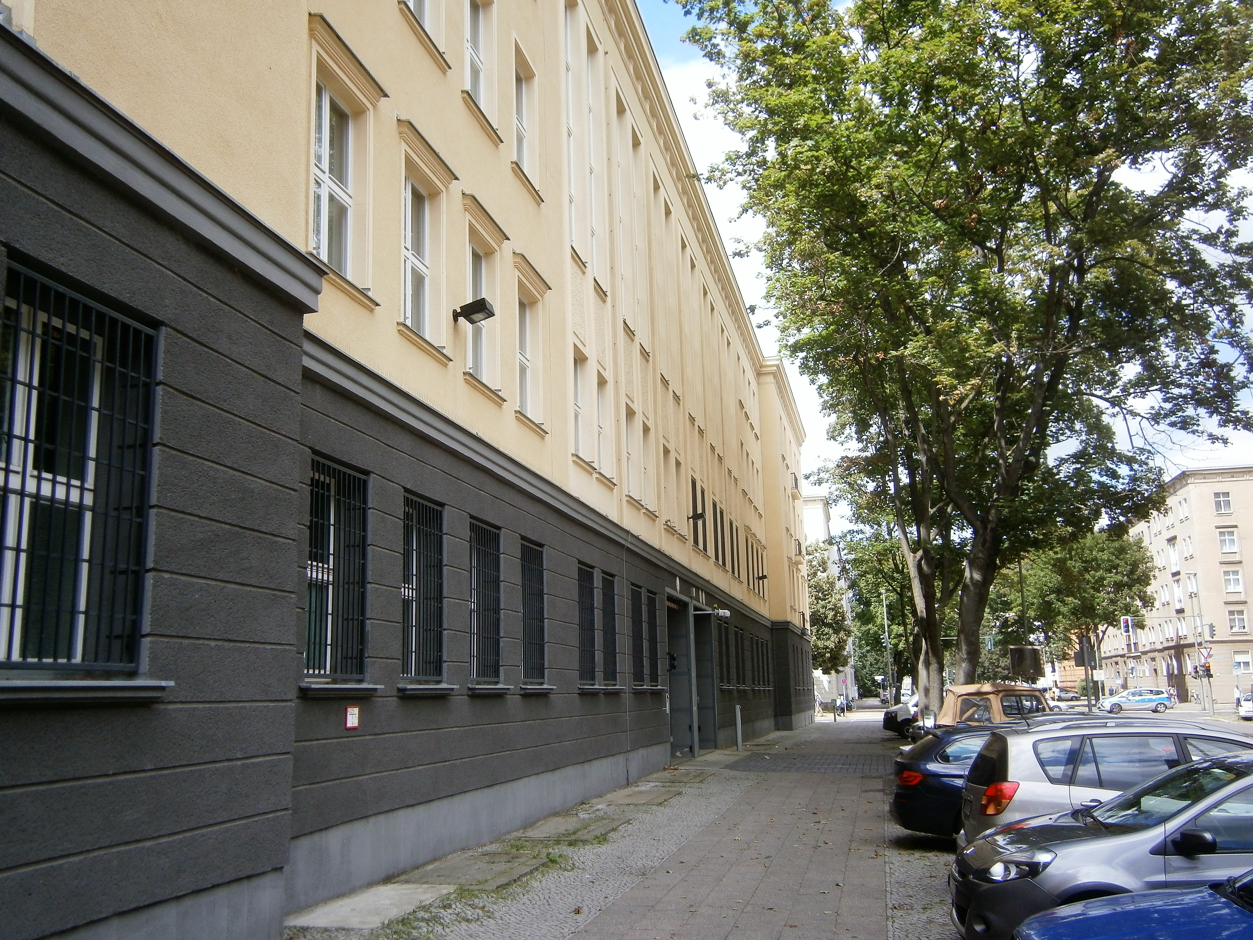 Die Marchlewskistraße ist eine Straße im Berliner Bezirk Friedrichshain-Kreuzberg, Ortsteil Friedrichshain. Angelegt und benannt wurde sie um 1870 auf dem Communicationsweg außerhalb der abgerissenen Berliner Zollmauer unter dem Namen Memeler Straße. Im Jahre 1950 erfolgte die Umbenennung in Marchlewskistraße. Schwere Schäden an der Bebauung bei Luftangriffen im Zweiten Weltkrieg brachten beim Neuaufbau Änderungen, jedoch der Straßenlauf blieb erhalten. Das Bild zeigt im Einzelnen: Der Ostgebäudeteil des Komplexes der Polizei- und Feuerwehrverwaltung entlang der Marchlewskistraße.